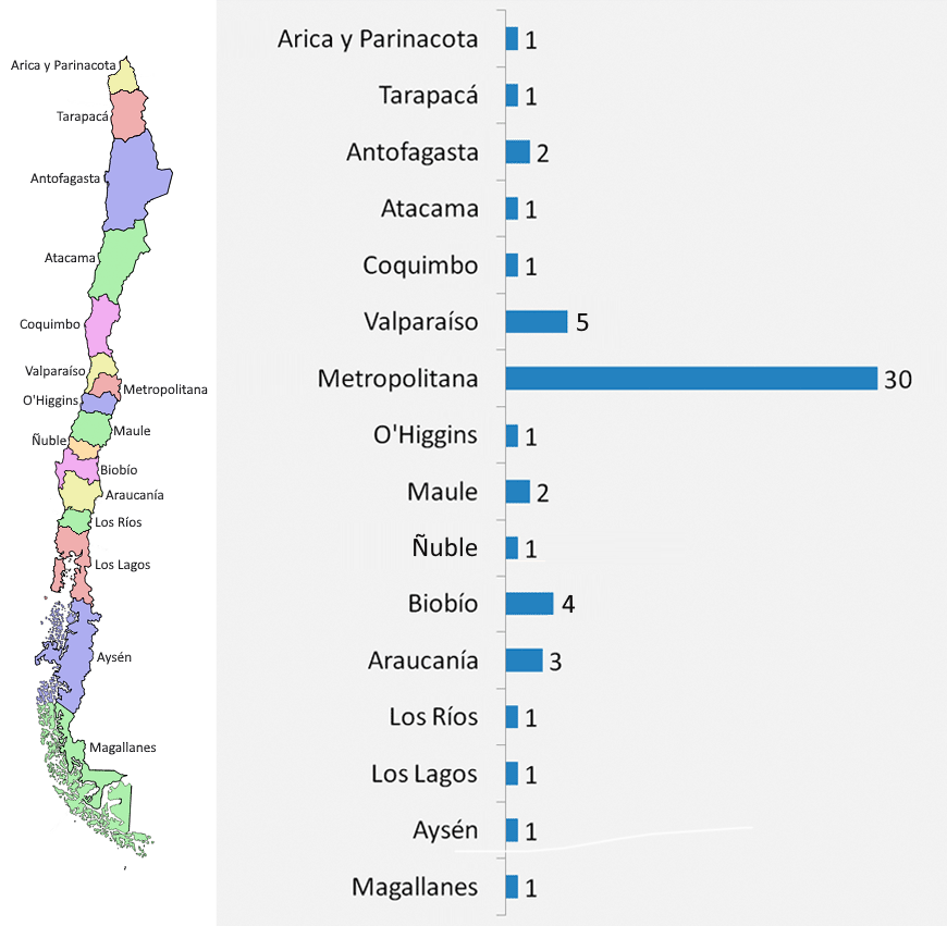 Distribuciones de universidades chilenas por región